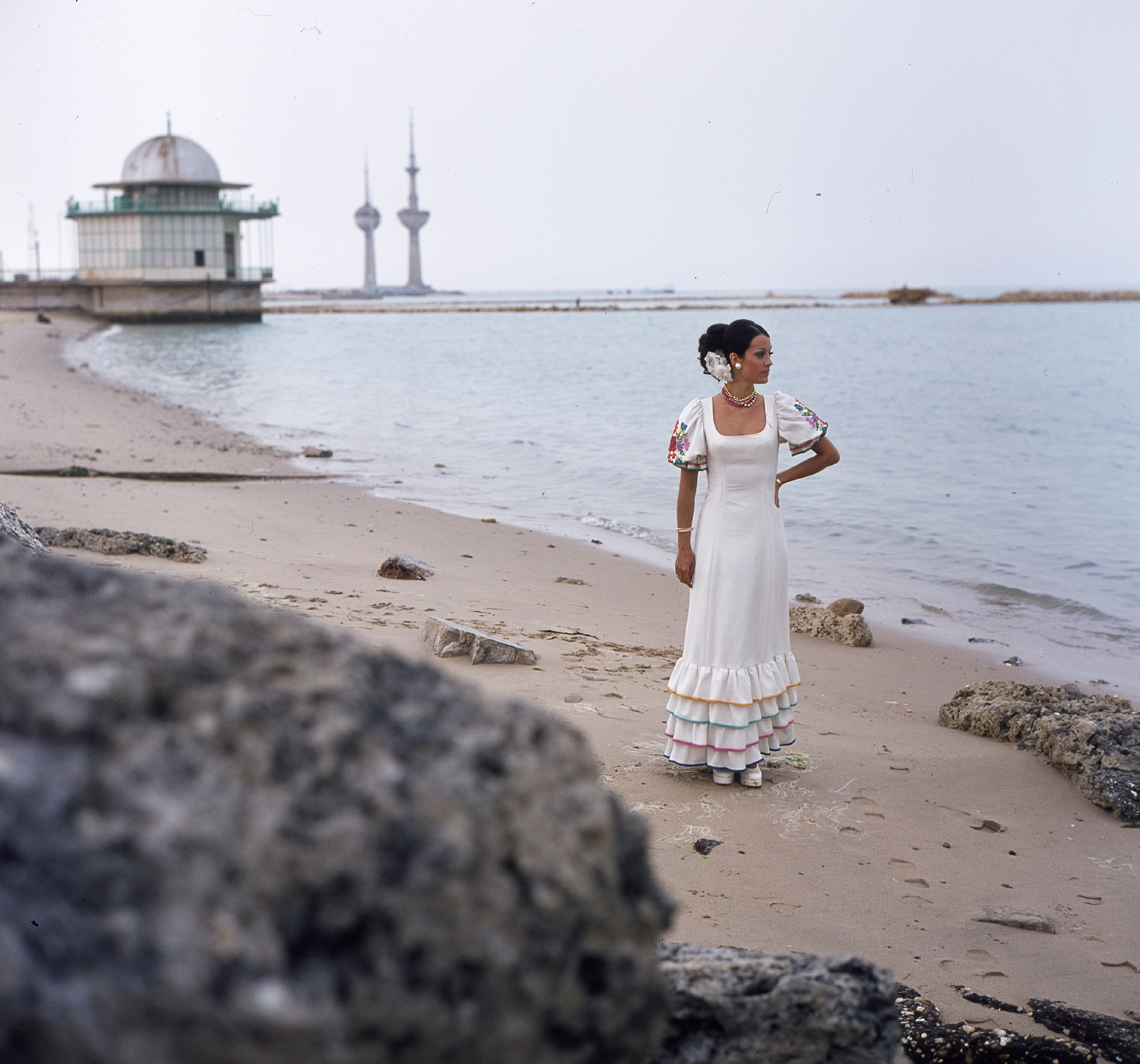 a Kuvaiti-öböl partja, háttérben a Kuwait Towers (víztornyok). Csató Mari manöken. Location: Kuwait Tags: colorful, sea shore, fashion, tower, maxi dresses, bun, summer dresses, bracelet, platform shoes, lady, necklace, earring Title: a Kuvaiti-öböl partja, háttérben a Kuwait Towers (víztornyok). Csató Mari manöken.